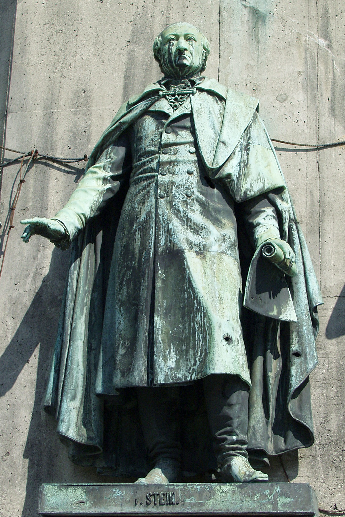 Statue des Heinrich Friedrich Karl vom Stein am Friedrich Wilhelm III.-Reiterstandbild auf dem Kölner Heumarkt.